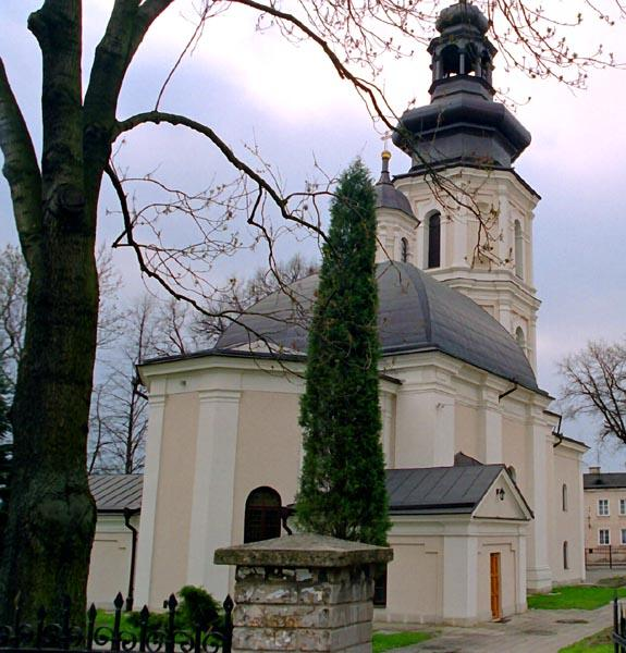 Zamosc (Poland)